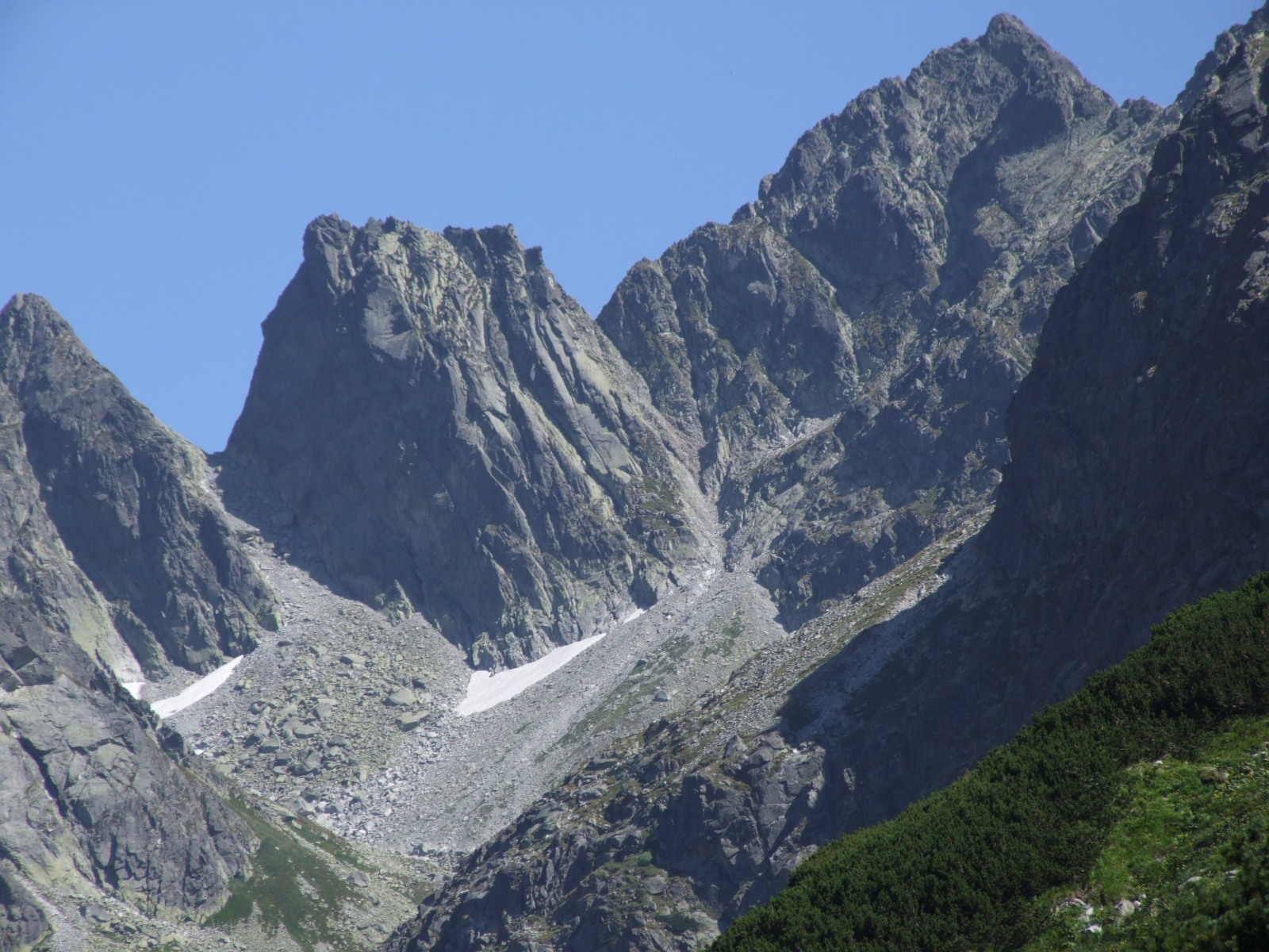 Górna część Doliny Złomisk i szczyty grani głównej